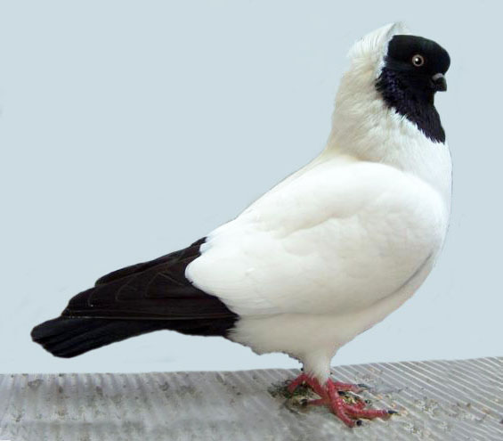 Nun Pigeon (Black)